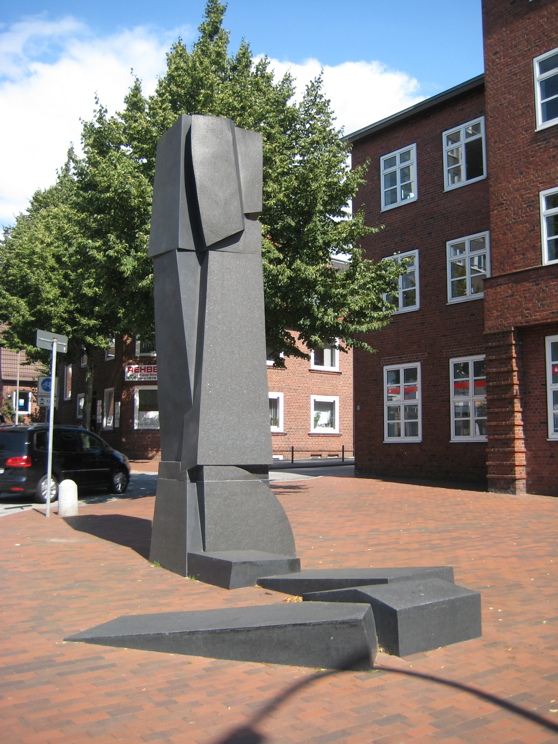 Jörg Plickat,"Dithmarscher Stele", 1995 zum 175-Jährigen Jubiläum der Sparkasse in Steinburg auf dem Ditrhmarscher Platz in Itzehoe aufgestellt